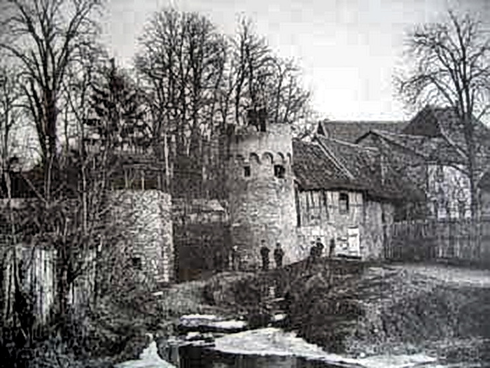 Das Ohrenbrücker Tor um 1900 Kategorie:Bild:Tor